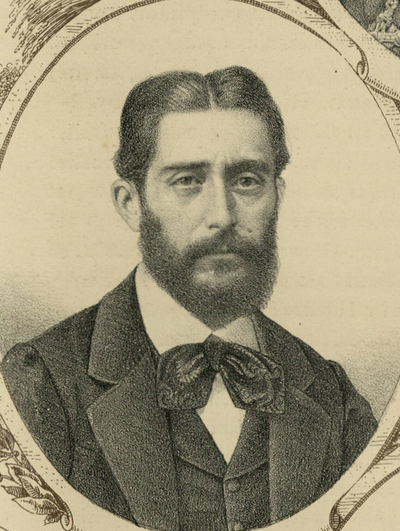 Lámina de Los diputados pintados por sus hechos. M. García Cuesta, Cruz Ochoa, Cirilo Álvarez, L. Gómez de Terán.